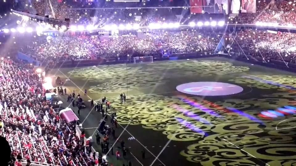 Açılış Stad İçersinden Bir Görünüm